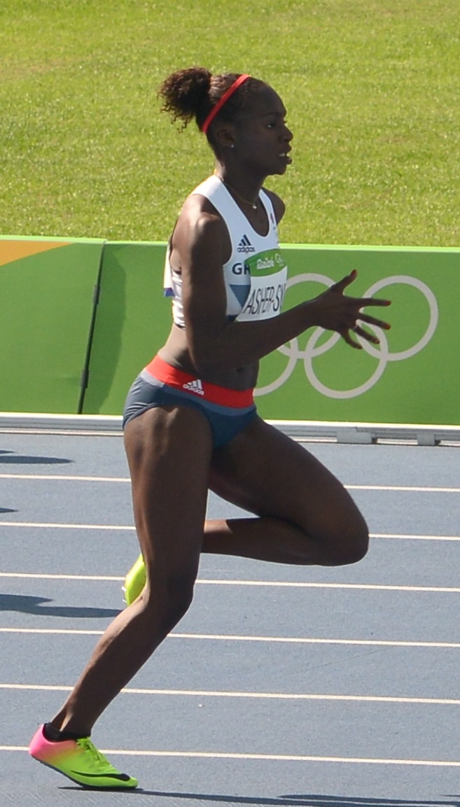 Dina Asher-Smith dans la 5ème série du 200m des JO de Rio 2016